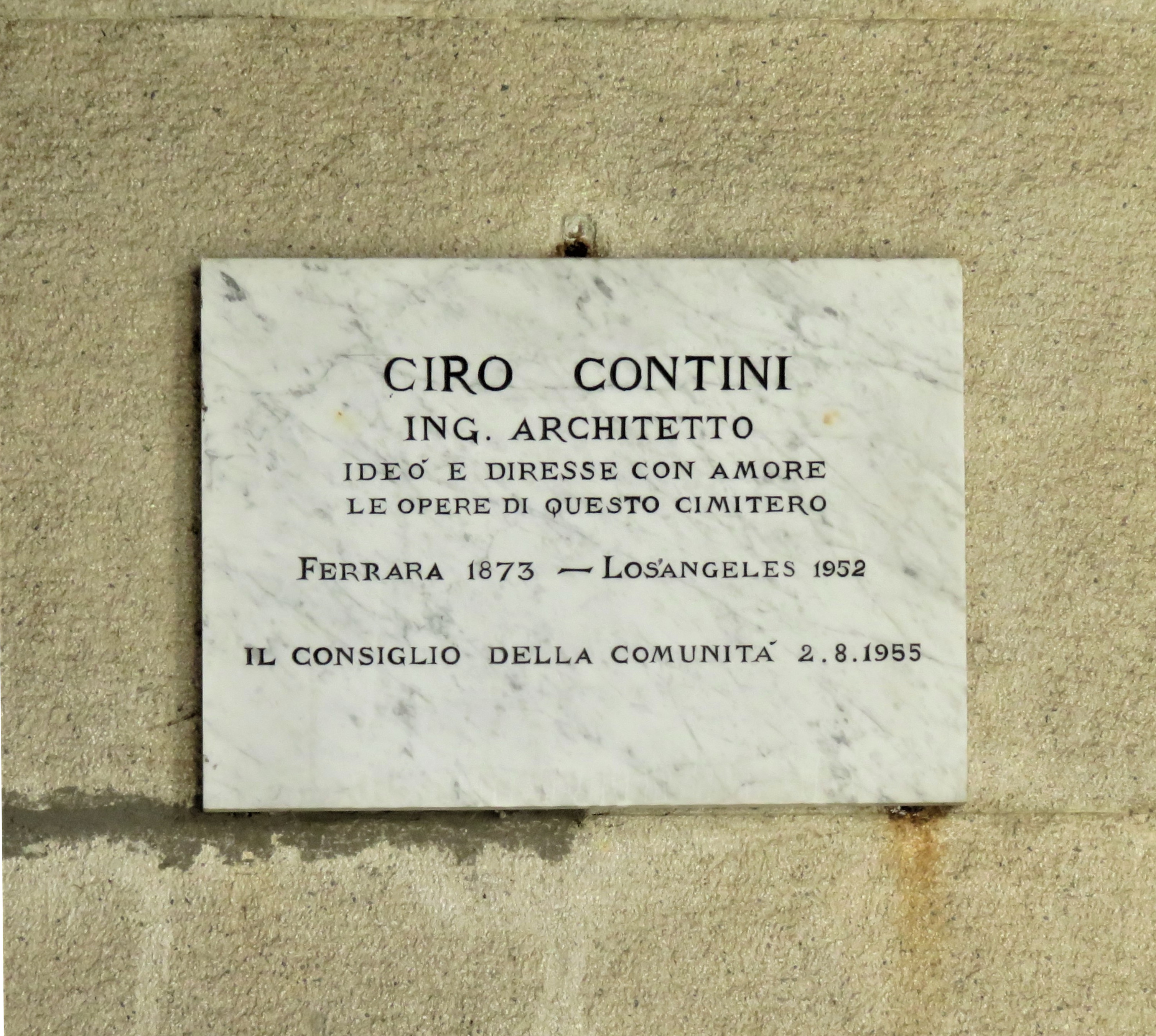 Epigrafe a ricordo di Ciro Contini (Ferrara, 25 febbraio 1873 – Los Angeles, 1952). Ingegnere italiano di origini ebraiche.